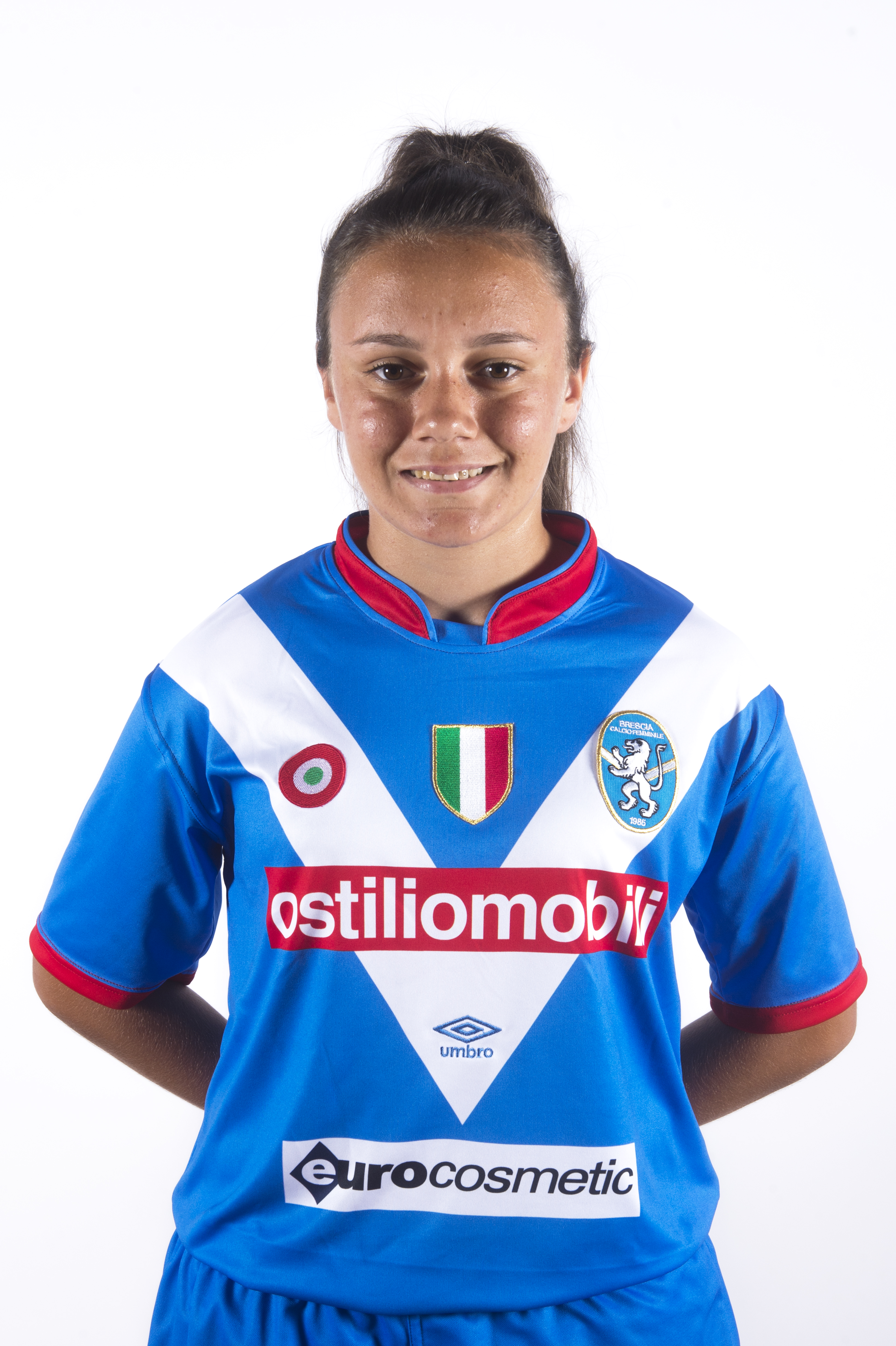 Annamaria Serturini, centrocampista, foto ufficiale Brescia Calcio Femminile stagione 2015-2016.